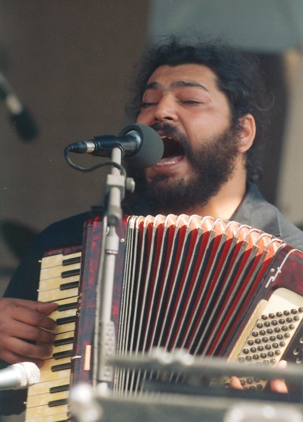 Mário Bihári, Olomouc, Czech Republic